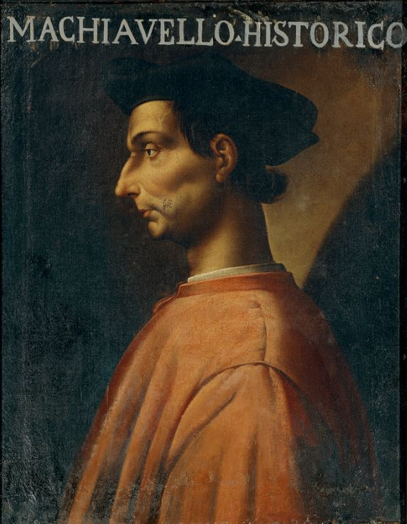 Indicazioni sul soggetto: RITRATTI: Niccolò Machiavelli; ABBIGLIAMENTO: copricapo, camicia e veste.